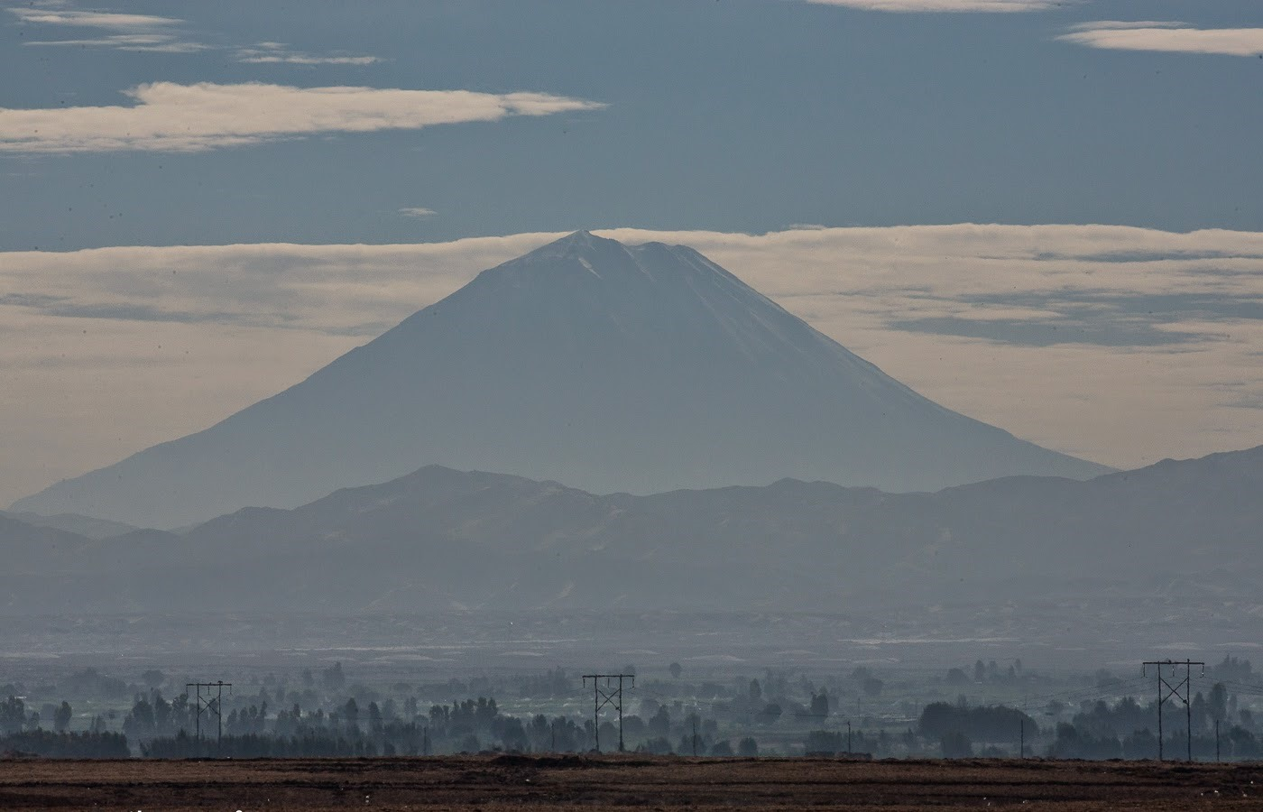 Una vista de San Camilo y el Misti al fondo